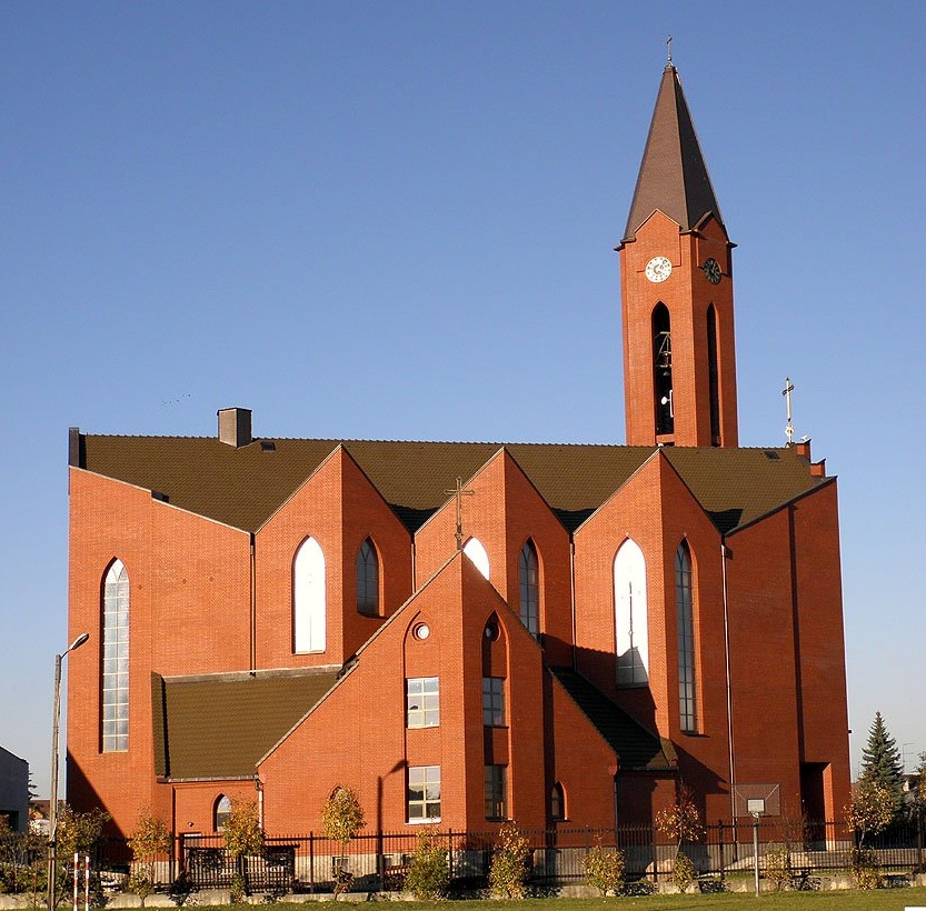 Kościół Matki Bożej Częstochowskiej w Radomiu